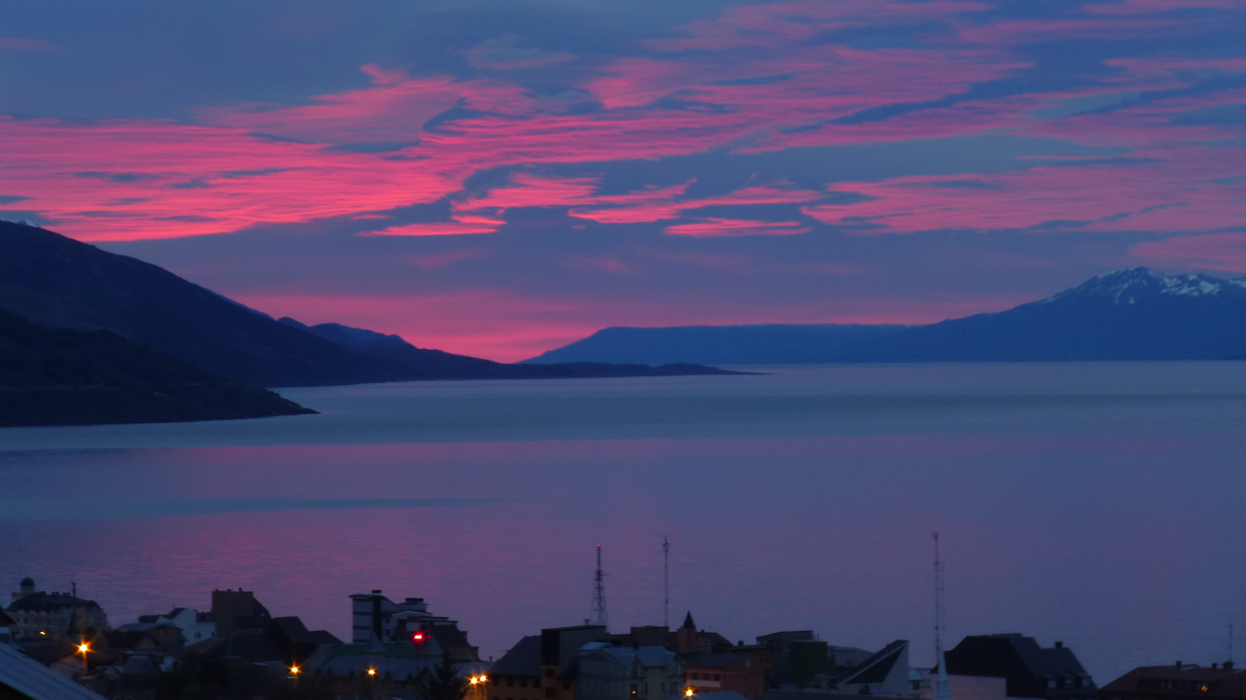 Amanecer tomado en Ushuaia,Tierra del Fuego, Argentina.